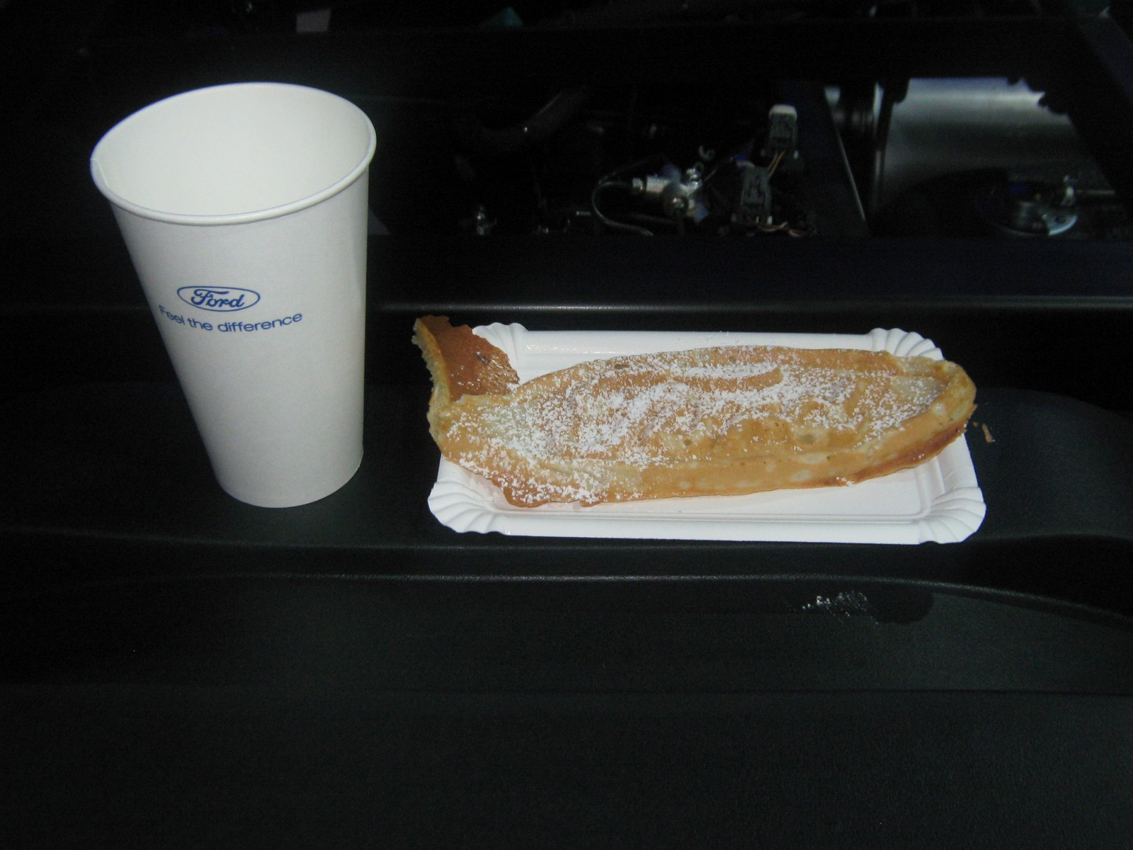 Internationale Automobilausstellung für Nutzfahrzeuge in Hannover 2010